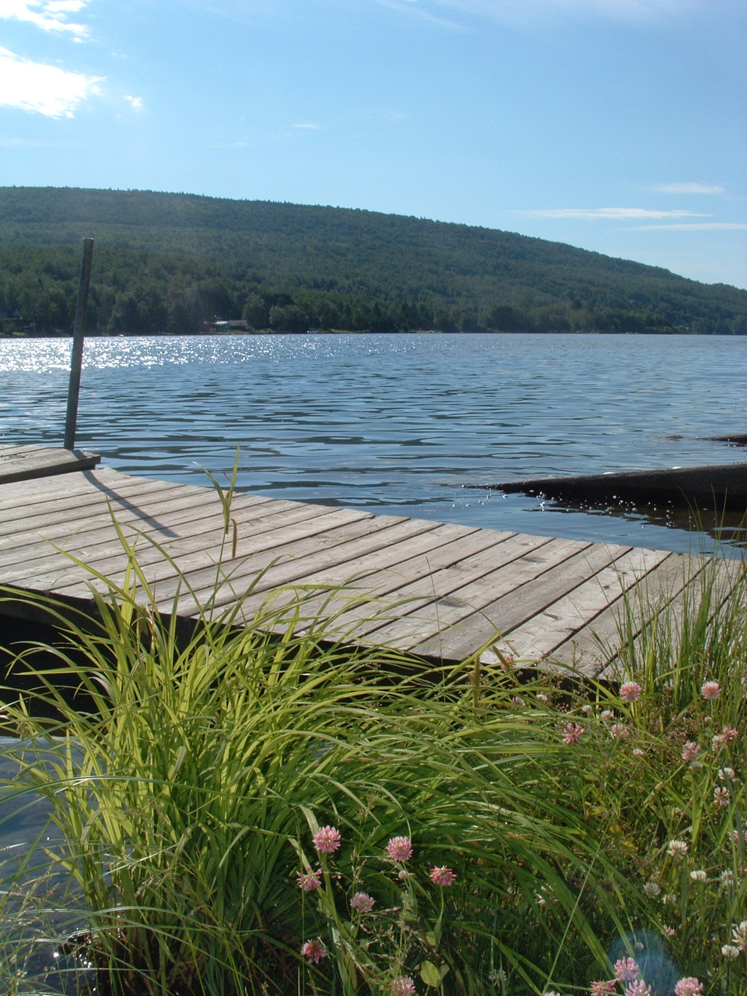 Débarcadère au Lac Long à Rivière-Bleue, Quebec, Canada.